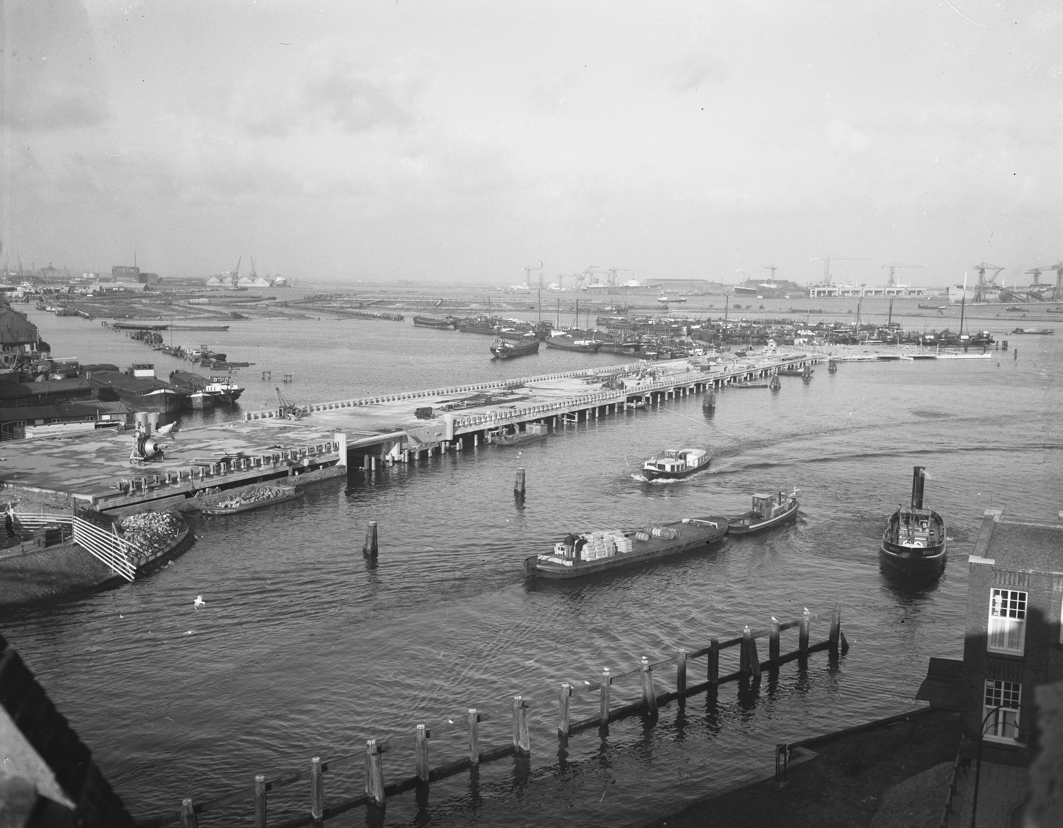 Collectie / Archief : Fotocollectie Anefo Reportage / Serie : [ onbekend ] Beschrijving : Pontsteiger Tasmanstraat in aanbouw Datum : 16 januari 1956 Trefwoorden : aanbouw, steigers Persoonsnaam : Tasmanstraat Fotograaf : Noske, J.D. / Anefo Auteursrechthebbende : Nationaal Archief Materiaalsoort : Negatief (zwart/wit) Nummer archiefinventaris : bekijk toegang 2.24.01.04 Bestanddeelnummer : 907-5431